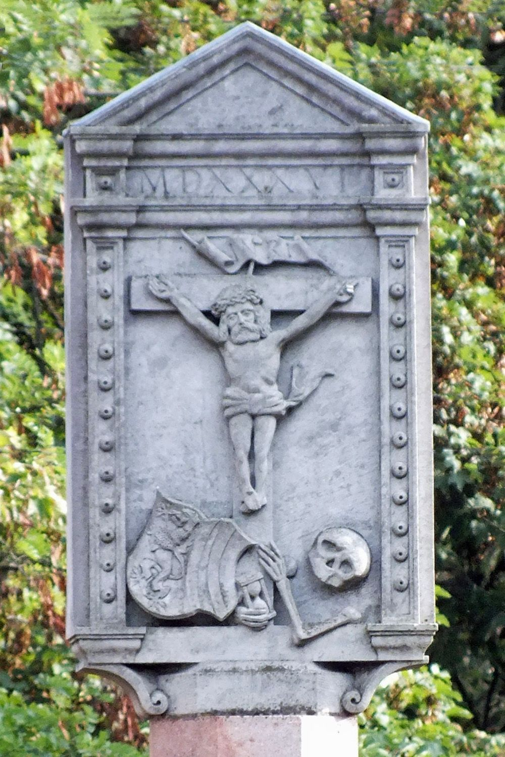 Die Nordseite der Bildplatte des Connewitzer Kreuzes